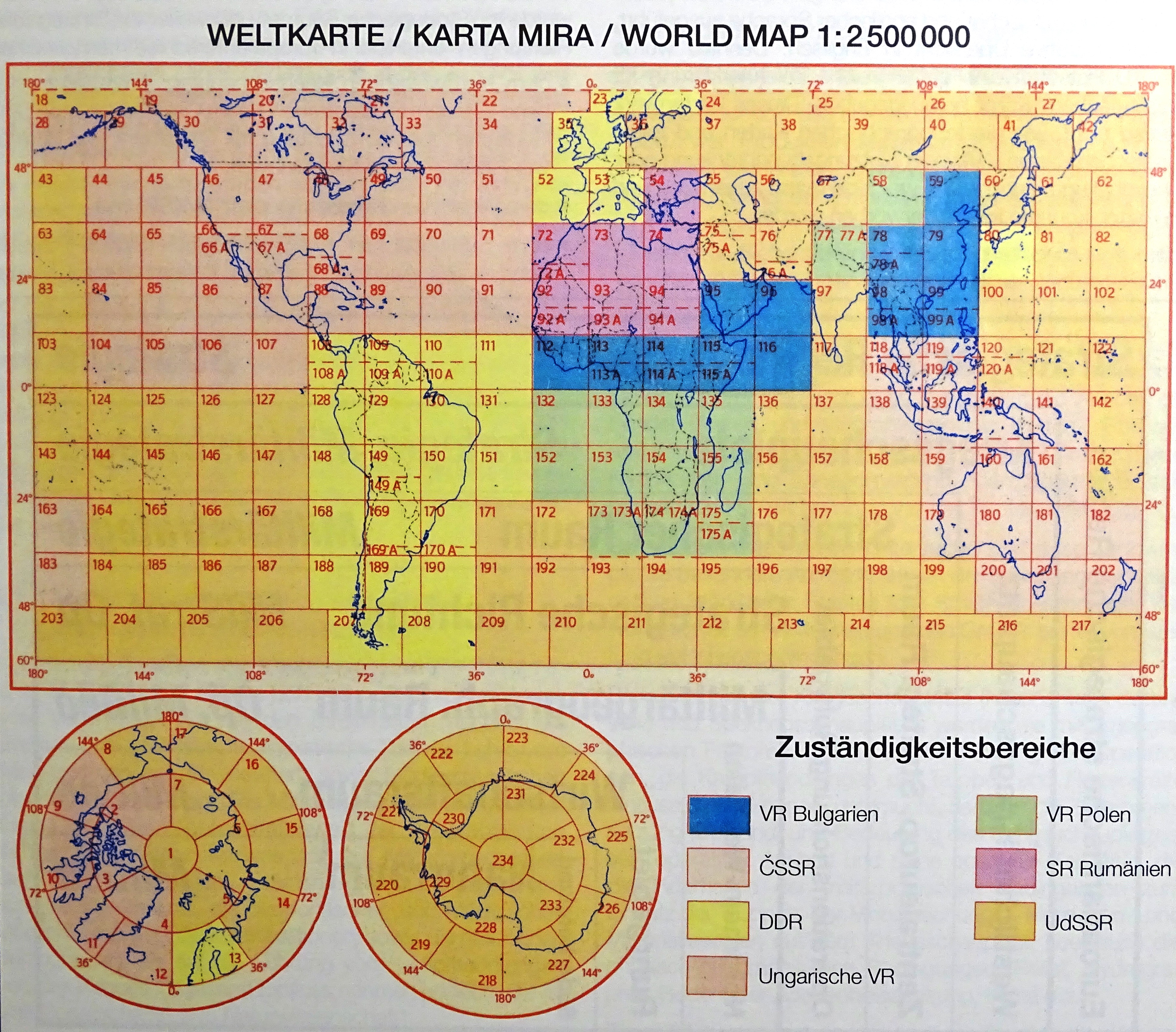 Allgemein-geographisches Weltkartenwerk KARTA MIRA / WORLD MAP, Blattübersicht und Zuständigkeitsbereiche zur Weltkarte 1ː2.500.000, 1. Ausgabe, 1976. Erstes Weltkartenwerk mit einheitlicher Gestaltung und einheitlicher Schreibweise geographischer Namen; geschaffen 1964–1976 von den Staaten des Warschauer Vertrages.